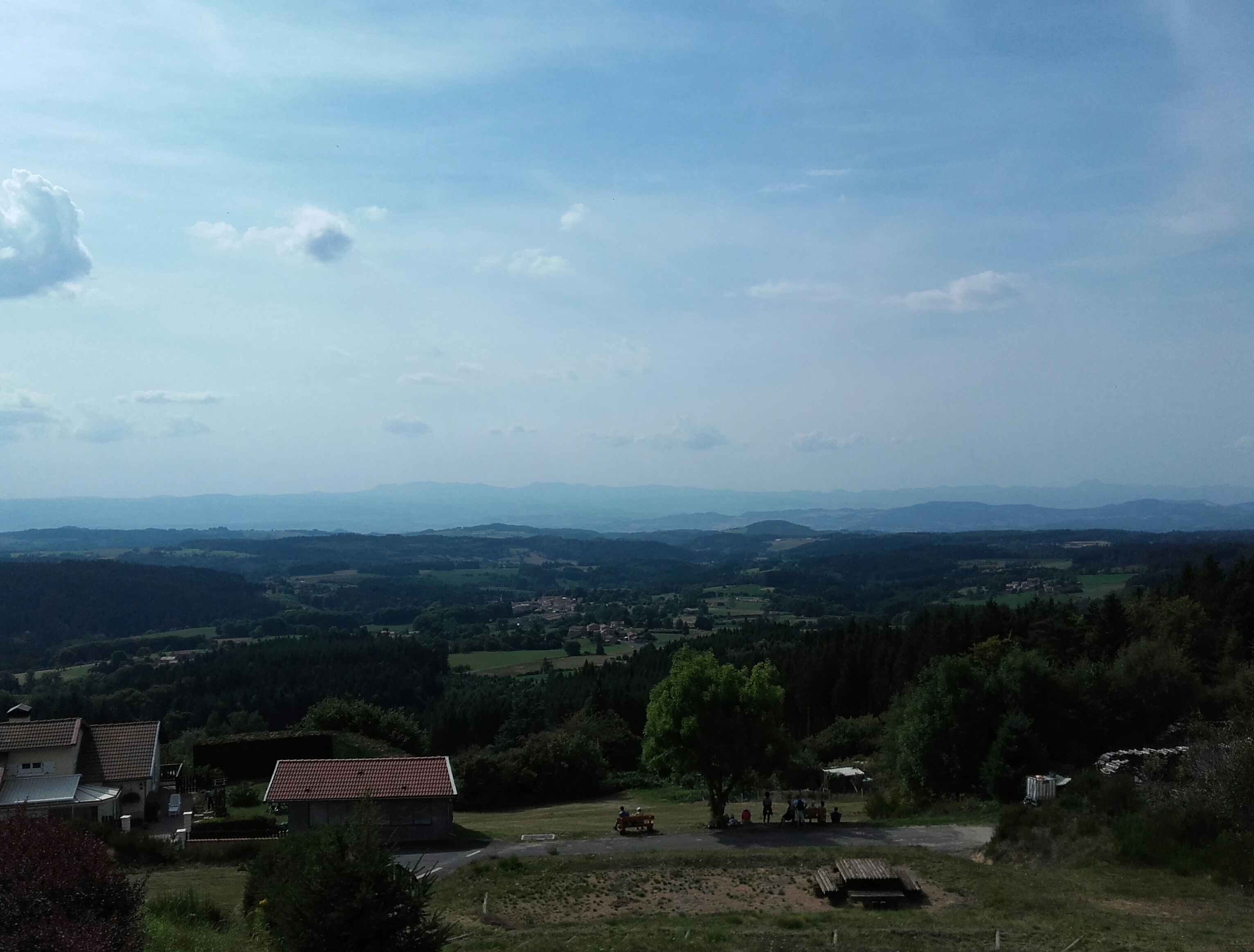 Vue depuis le belvédere Les Deux Frères, Echandelys - Puy de Dôme, France